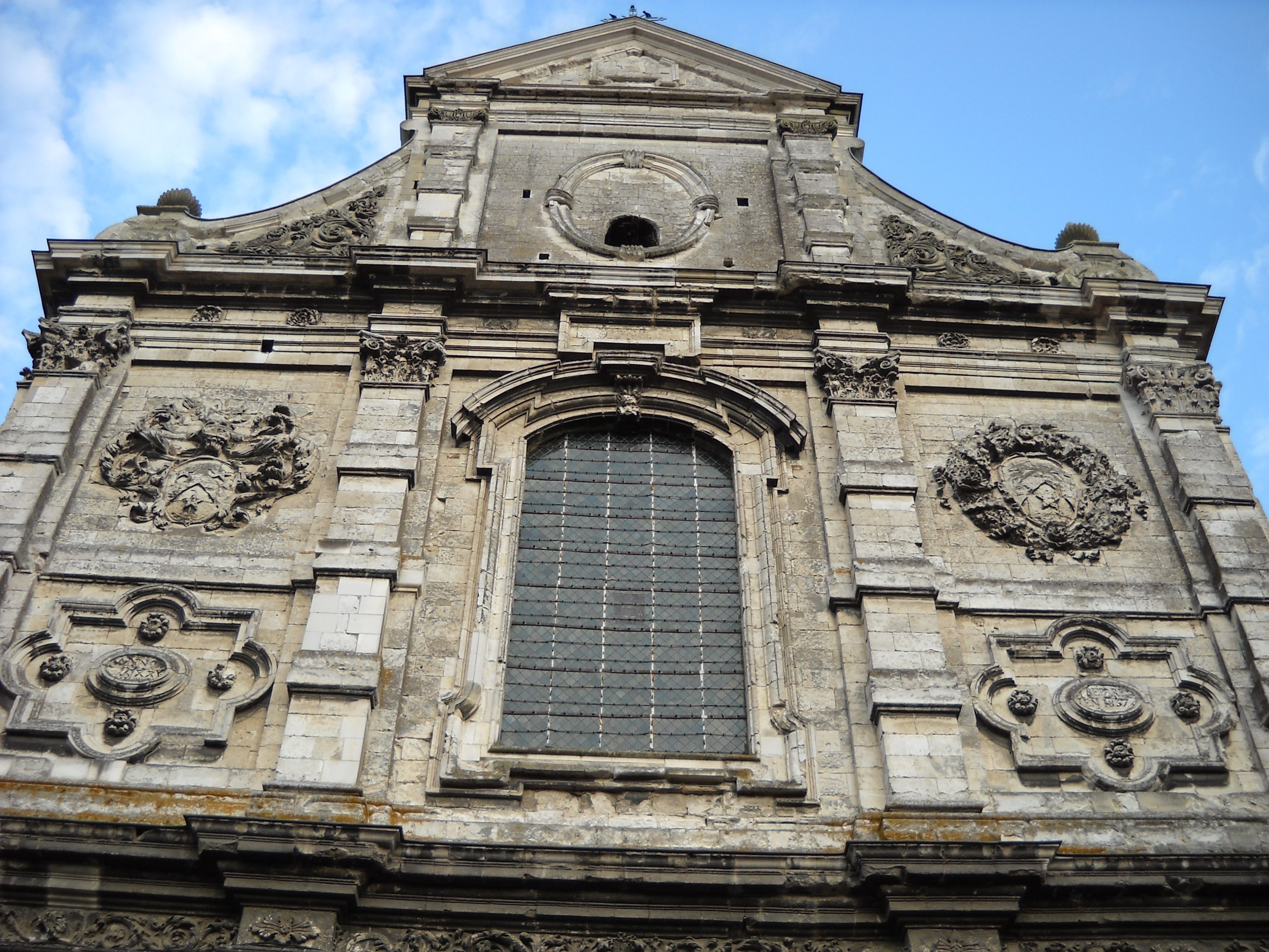 Aire-sur-la-Lys : Église Saint-Jacques le Majeur et Saint-Ignace